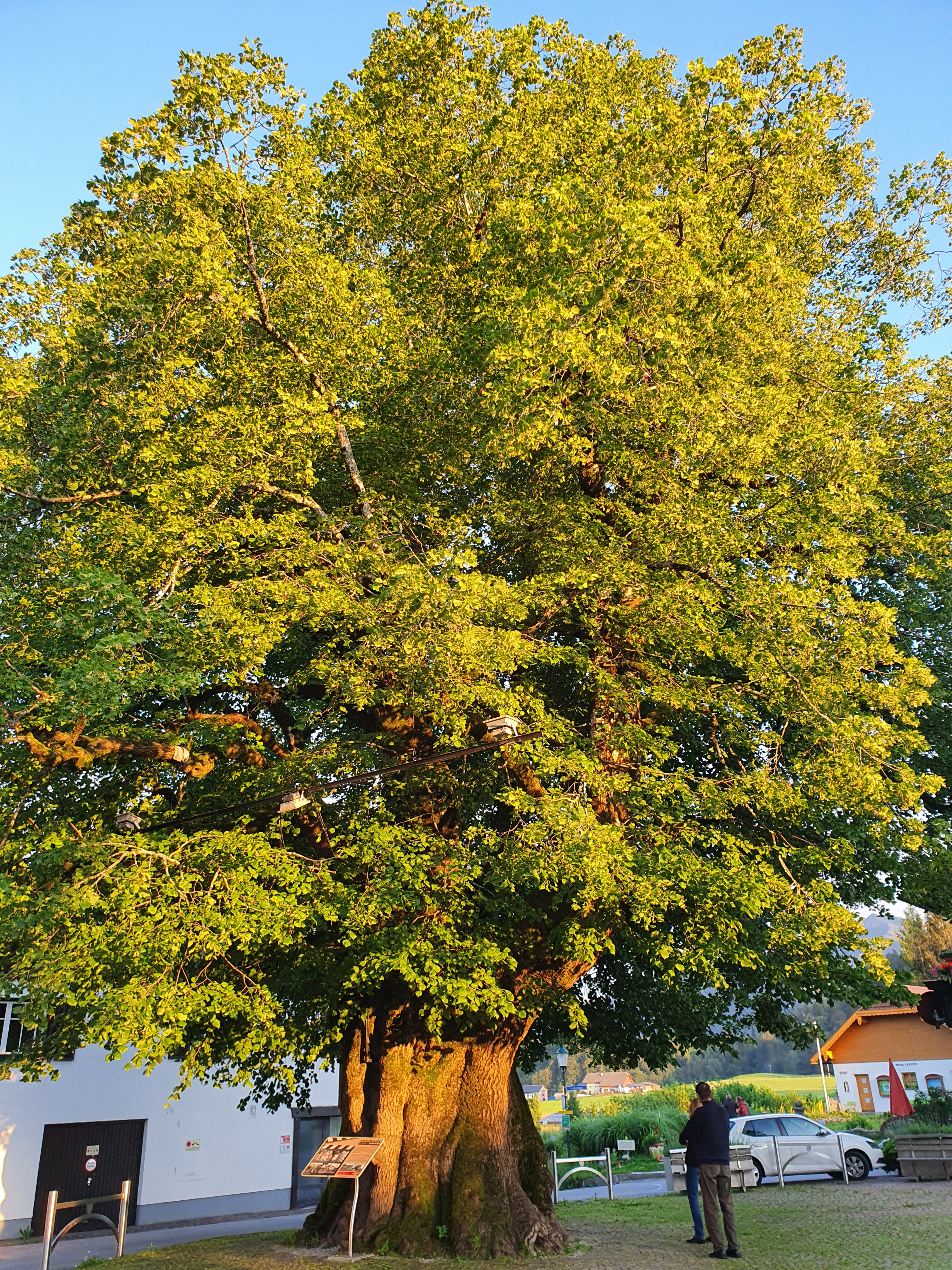 1000-jährige Linde Faistenau 2020